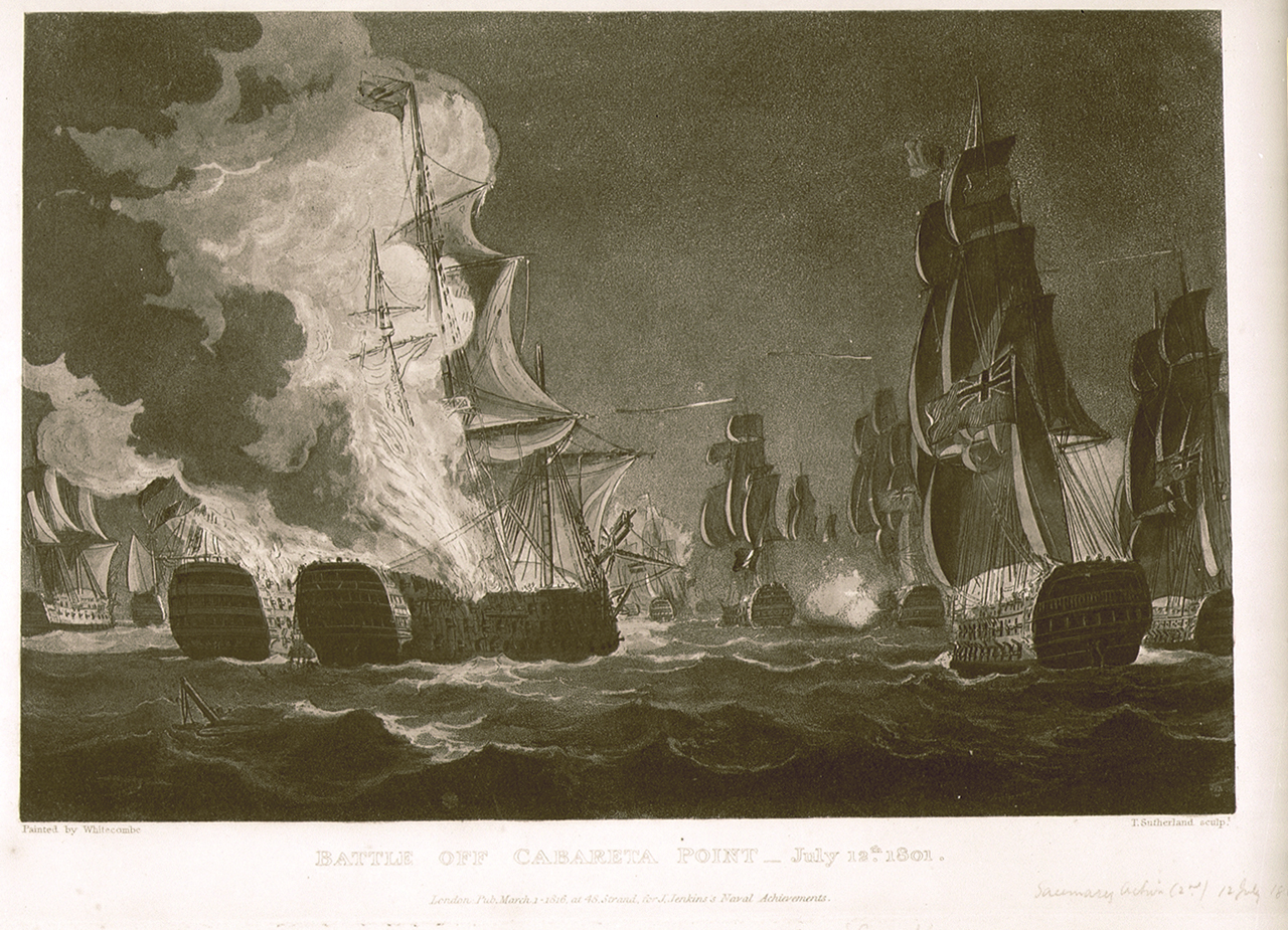 Во время Гибралтарского ночного сражения британская эскадра Сумареса атаковала франко-испанскую эскадру Хуана де Морено. В результате два испанских 112-пушечных корабля, приняв в темноте друг друга за неприятеля, свалились и вместе взлетели на воздух.